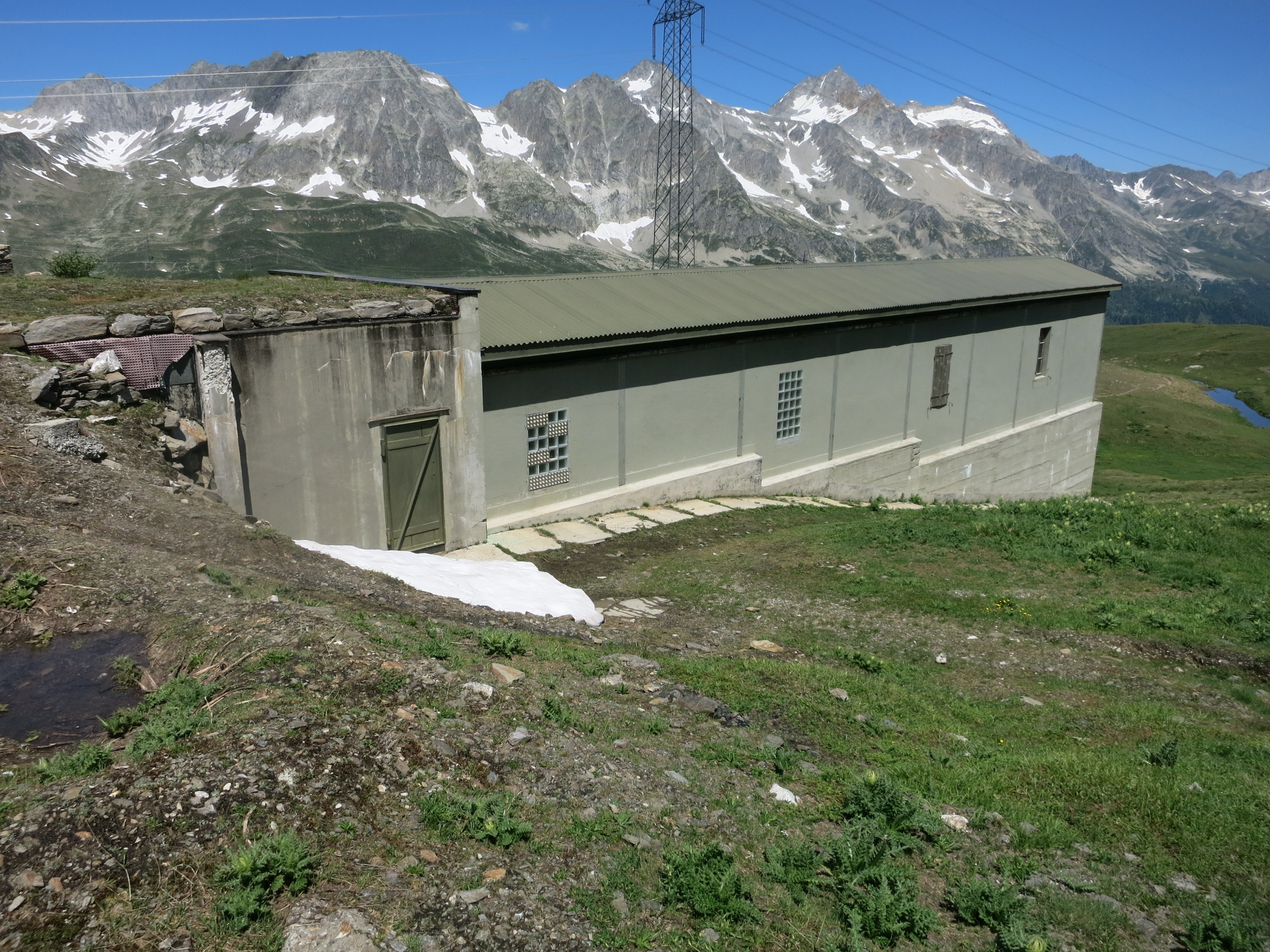 Infanteriewerk San Giacomo, Bedretto TI, Schweiz